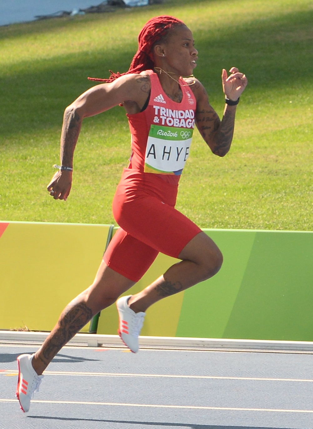 Michelle-Lee Ahye dans la 3ème série du 200m des JO de Rio de 2016